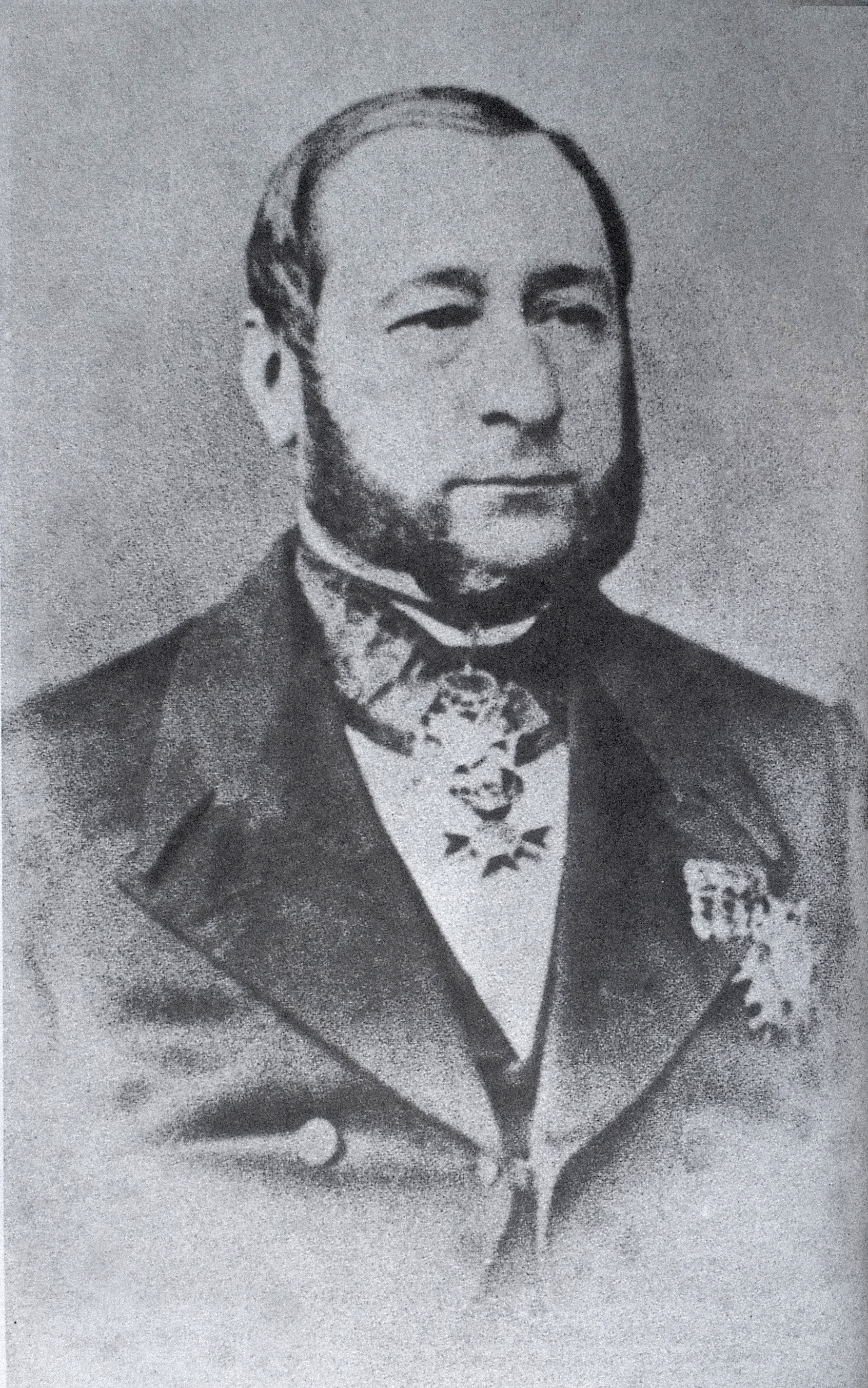 Oscar Massy (18??-1860). préfet de Tarbes au temps des apparitions à Bernadette Soubirous.